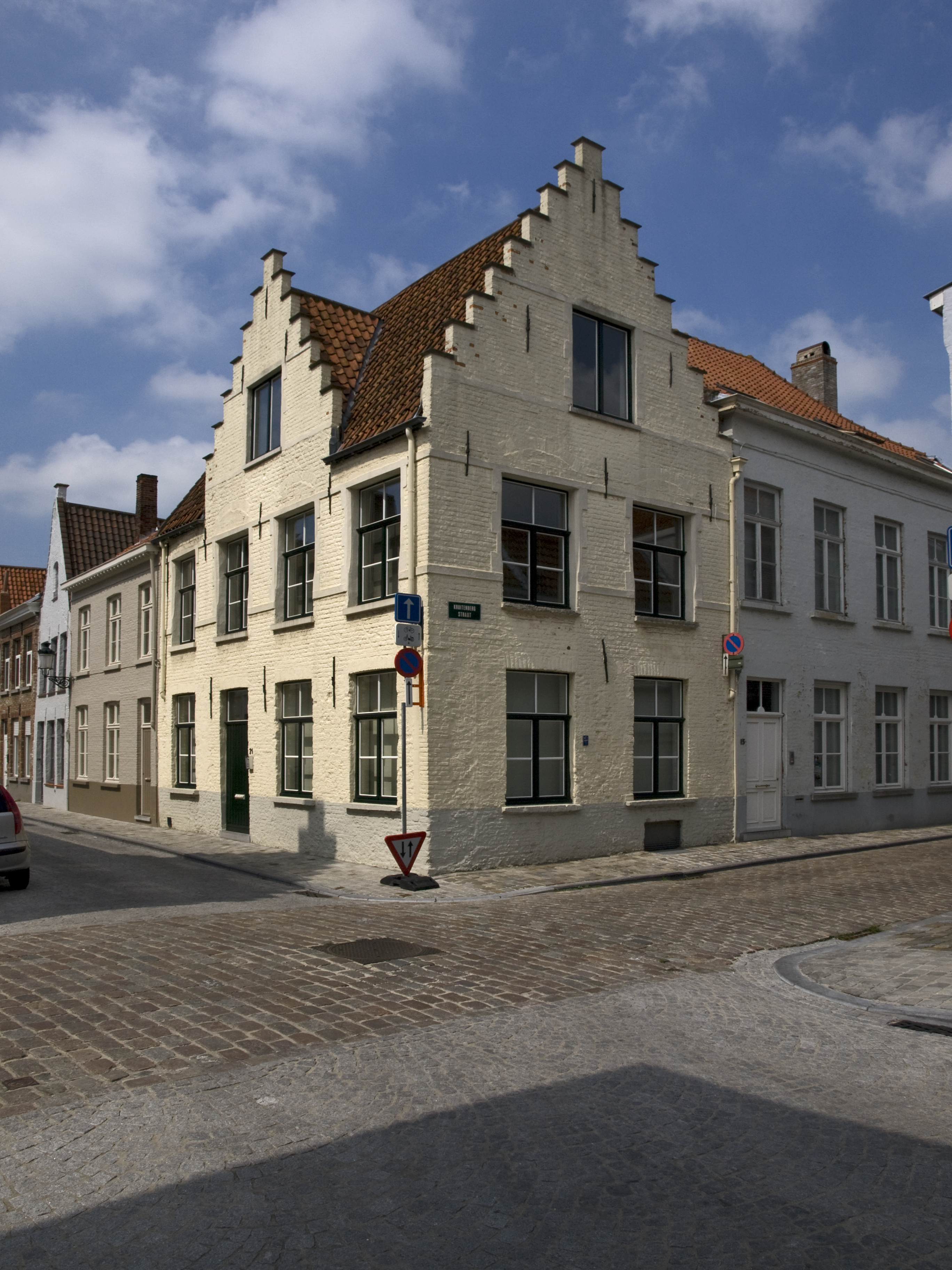 Zwarteleertouwersstraat 21, Brugge